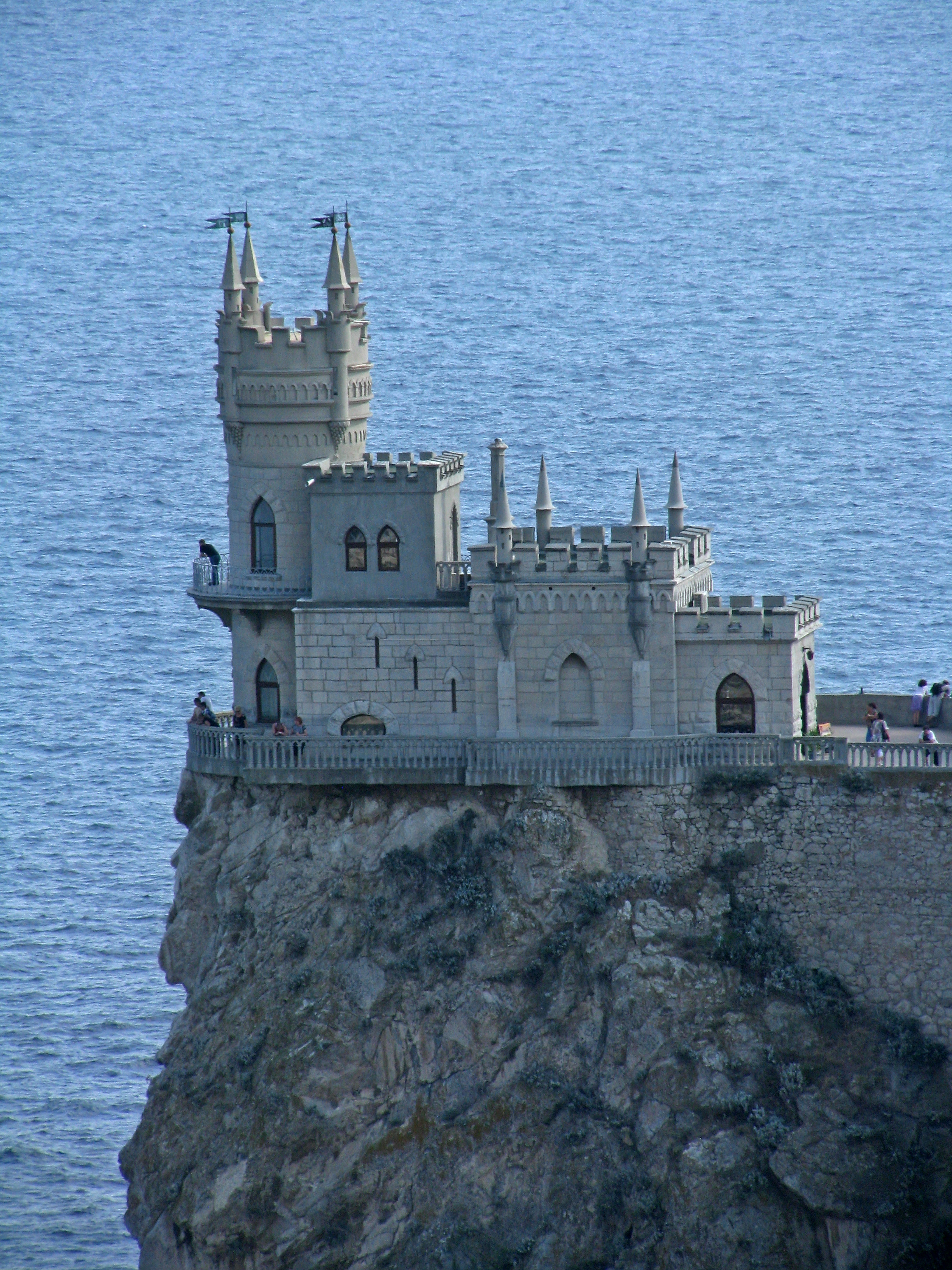 Палац «Ластівчине гніздо», Гаспра, вул. Алупкінське шосе, 9, літер «А»